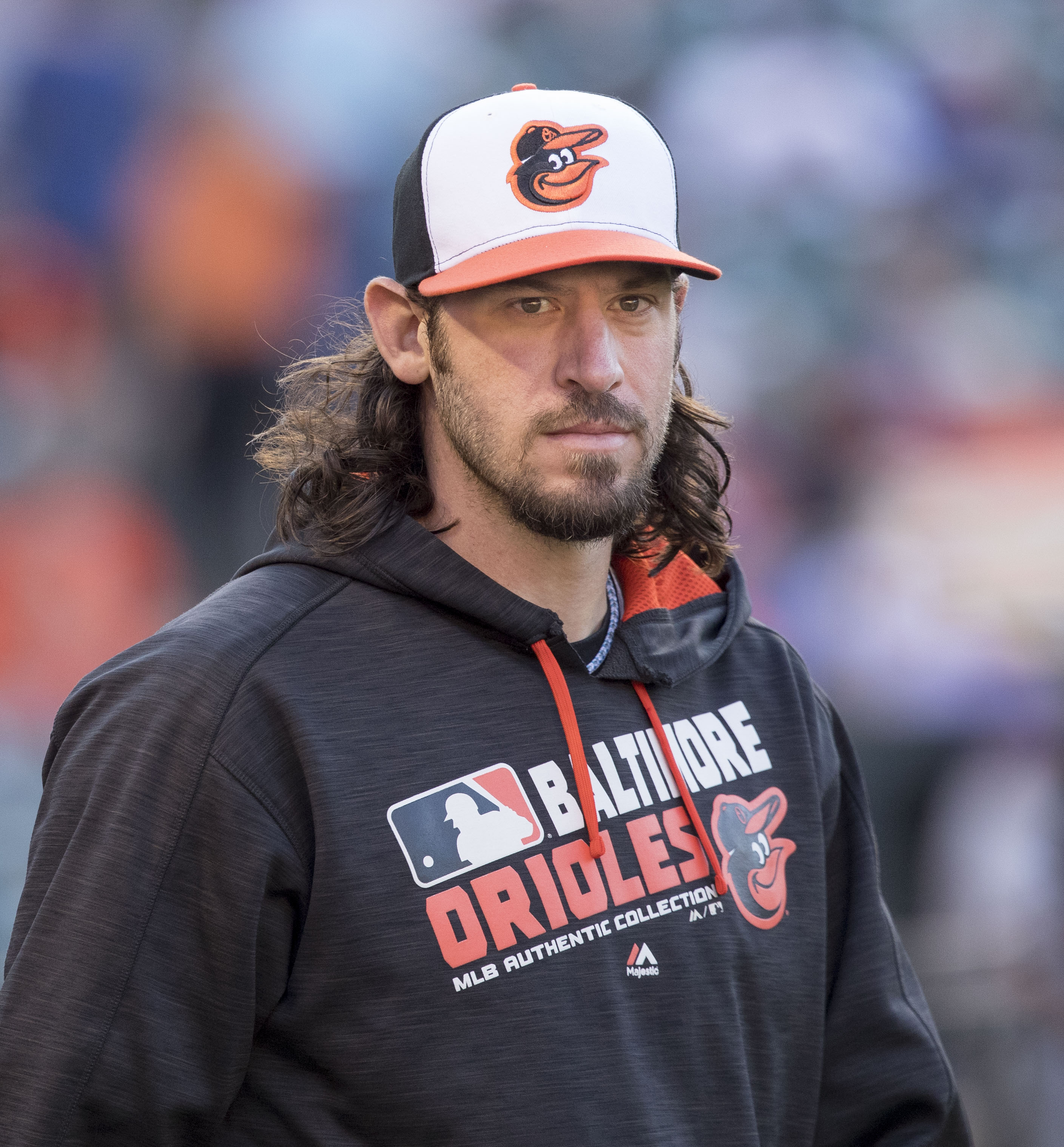 Logan Ondrusek